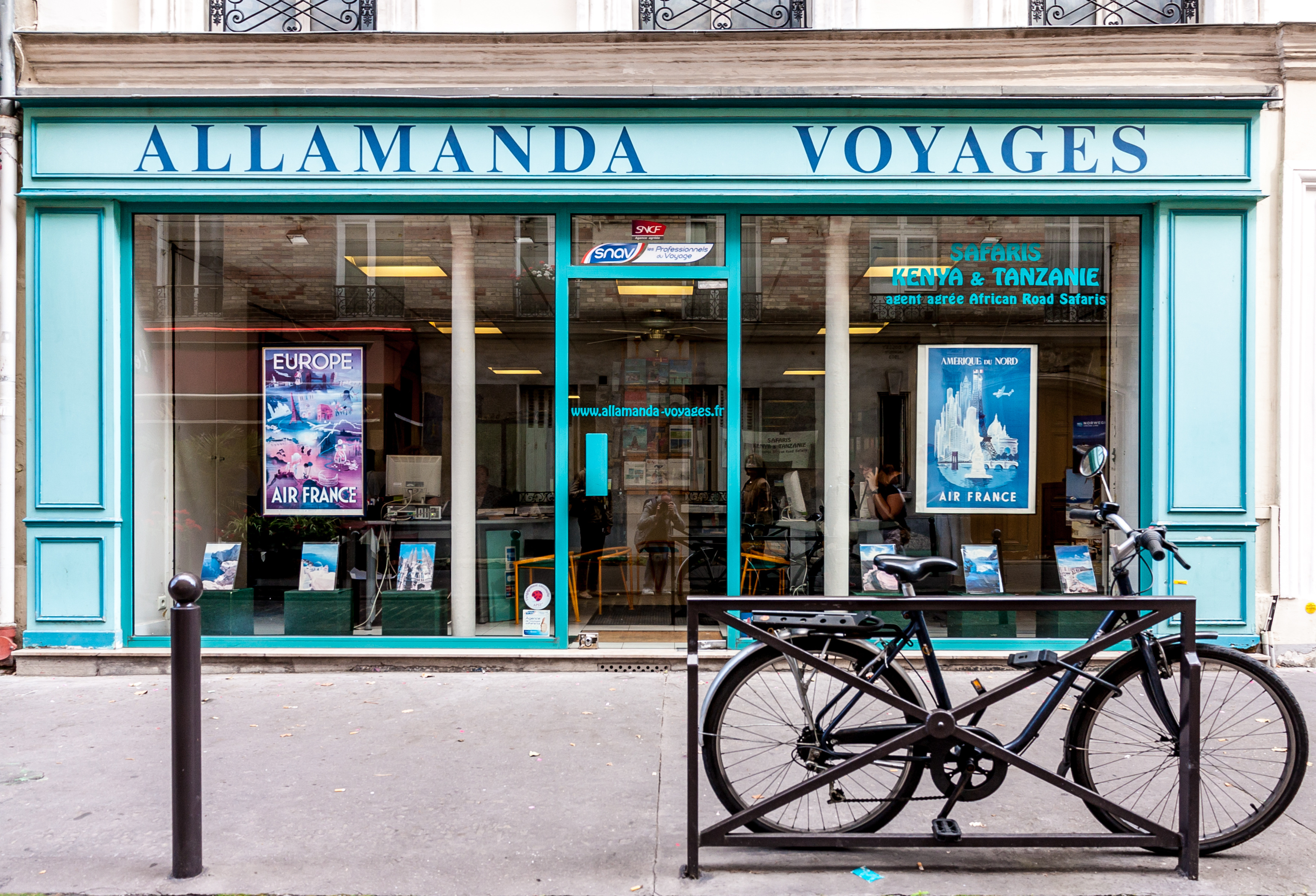 Allamanda Voyages, 3 Impasse de la Gaité, 75014 Paris, France.